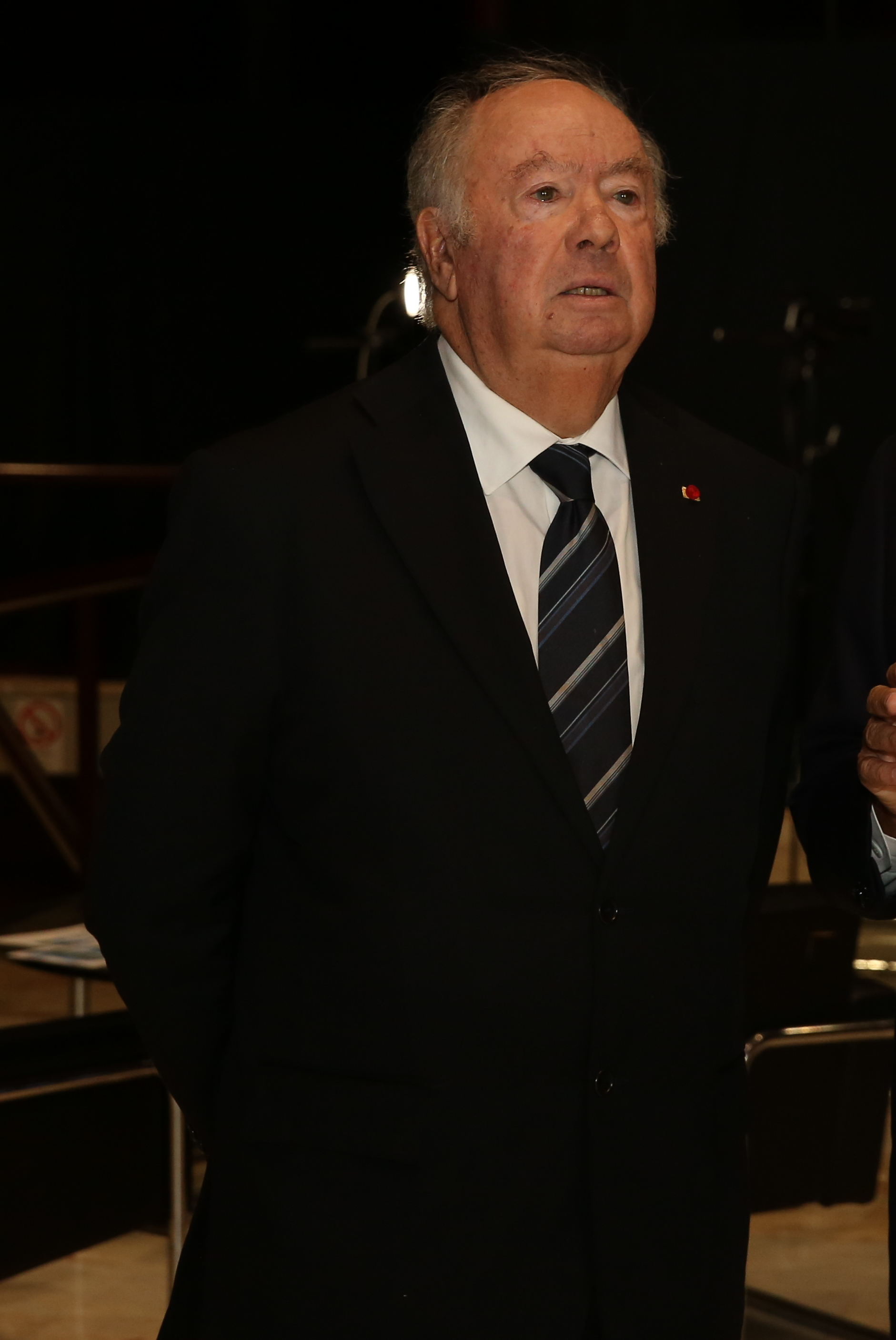 Alberto João Jardim na Assembleia Geral da Conferência das Regiões Periféricas Marítimas (CRPM). Funchal, Madeira, outubro de 2018.